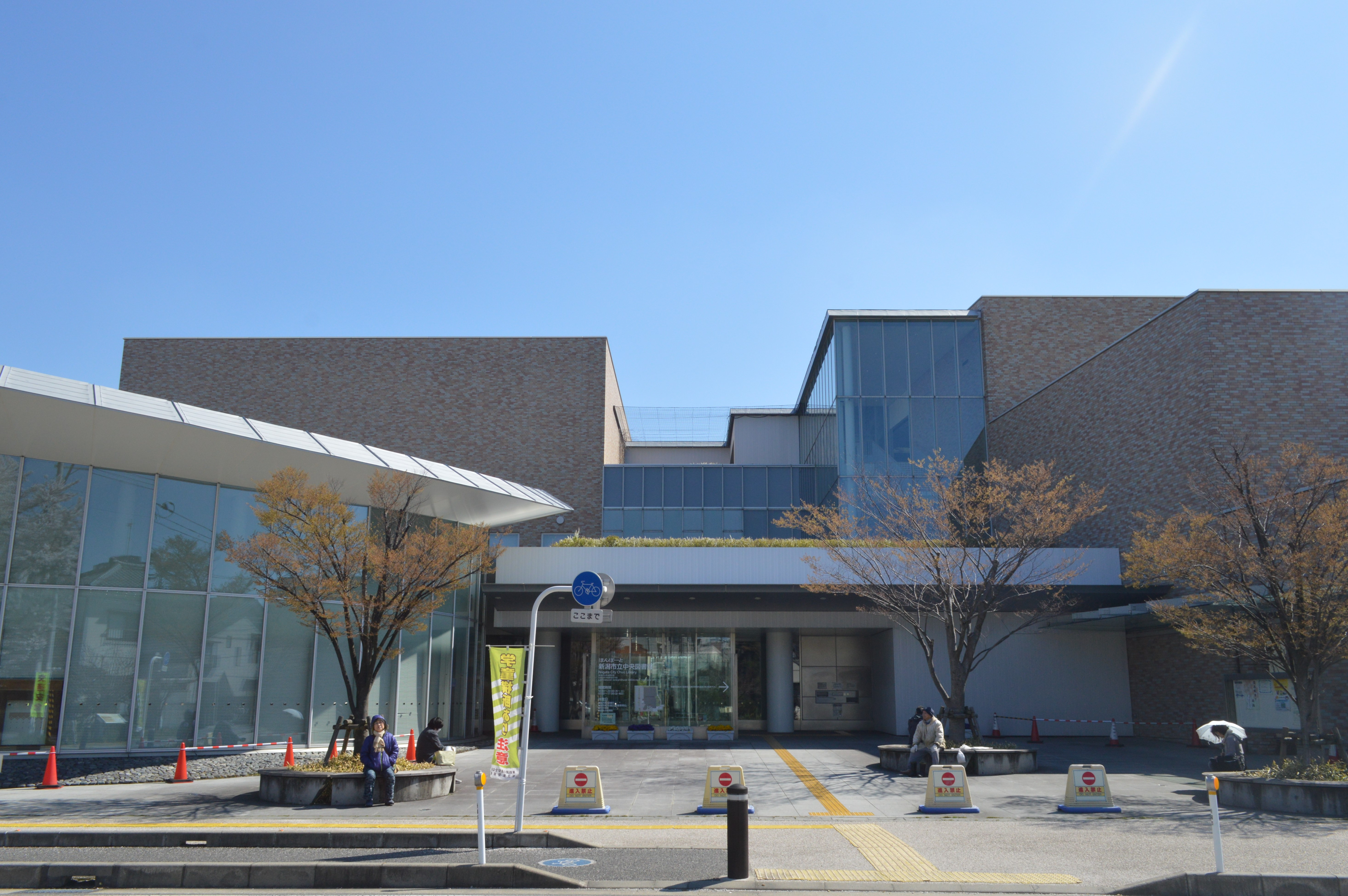 新潟県新潟市中央区にある新潟市立中央図書館「ほんぽーと」。